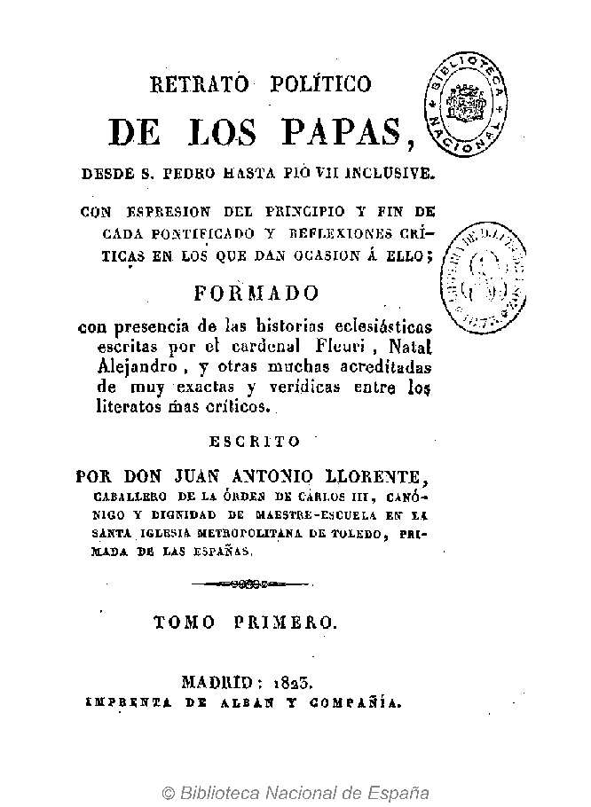 Retrato político de los Papas, desde S. Pedro hasta Pio VII inclusive : con espresion del principio y fin de cada pontificado y reflexiones críticas ... escrito por Don Juan Antonio Llorente. En dos tomos. Autor: Llorente, Juan Antonio (1756-1823) Fecha: 1823 Datos de edición: Madrid, imprenta de Alban y Compañía (Albán, Tomás)